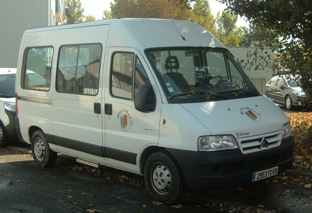 Un Citroën Jumper du réseau Distribus dans une rue de Saint-Louis.